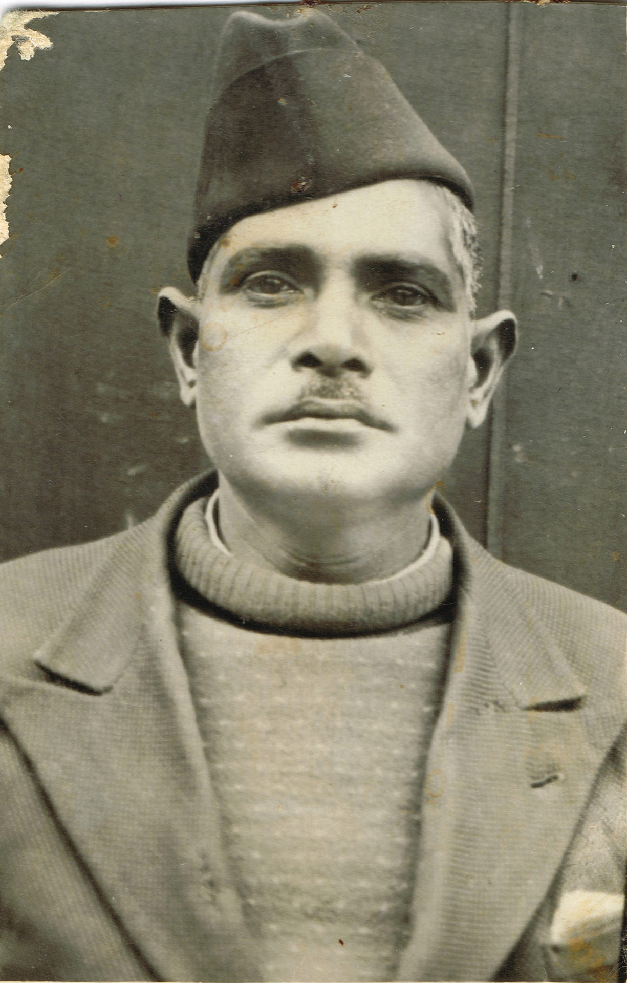 کوردی: گۆگۆل جاند مکورجی